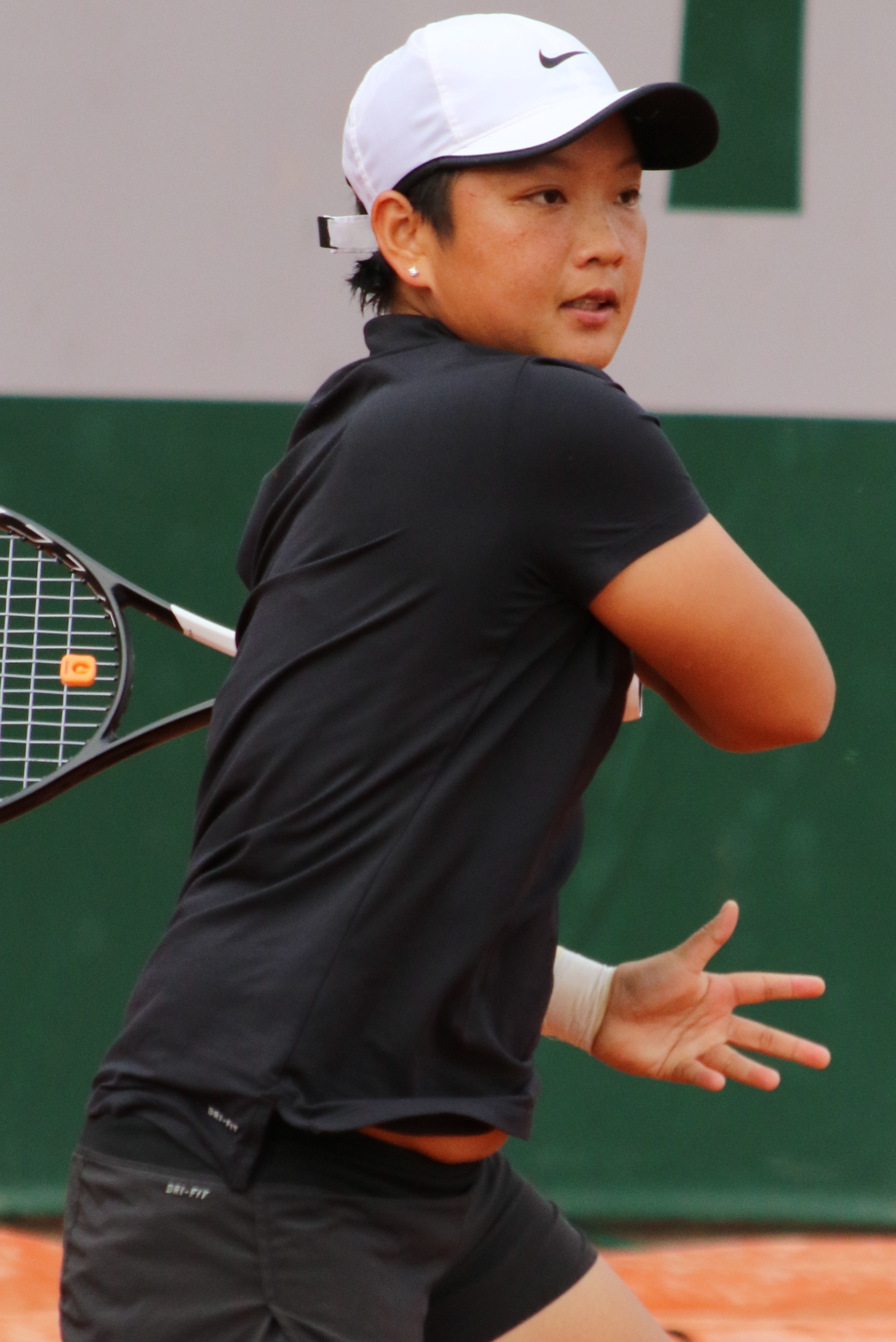 Jiang RG19 (12)